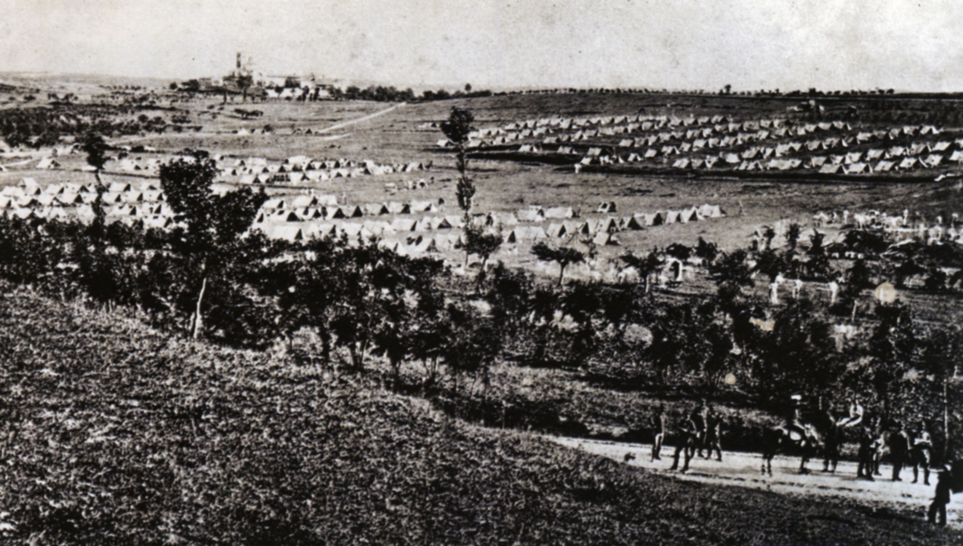 il campo dell’Armata sarda in località Madonna della Scoperta (Lonato, Brescia), il 23 giugno 1859, giorno precedente alle battaglie di San Martino e Solferino